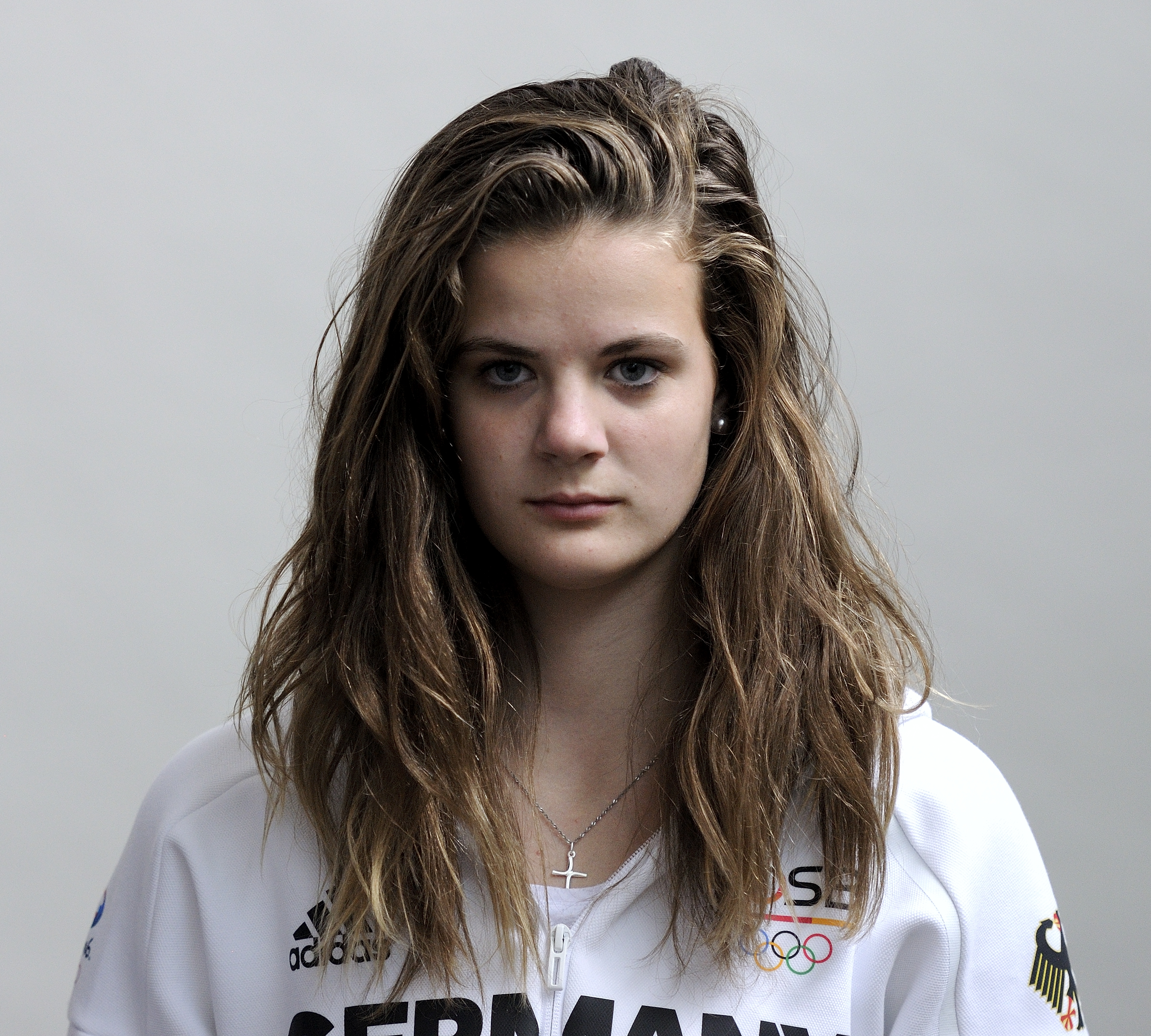 Bild aufgenommen in Hannover während der Einkleidung der deutschen Olympiamannschaft 2016. Elena Wassen.